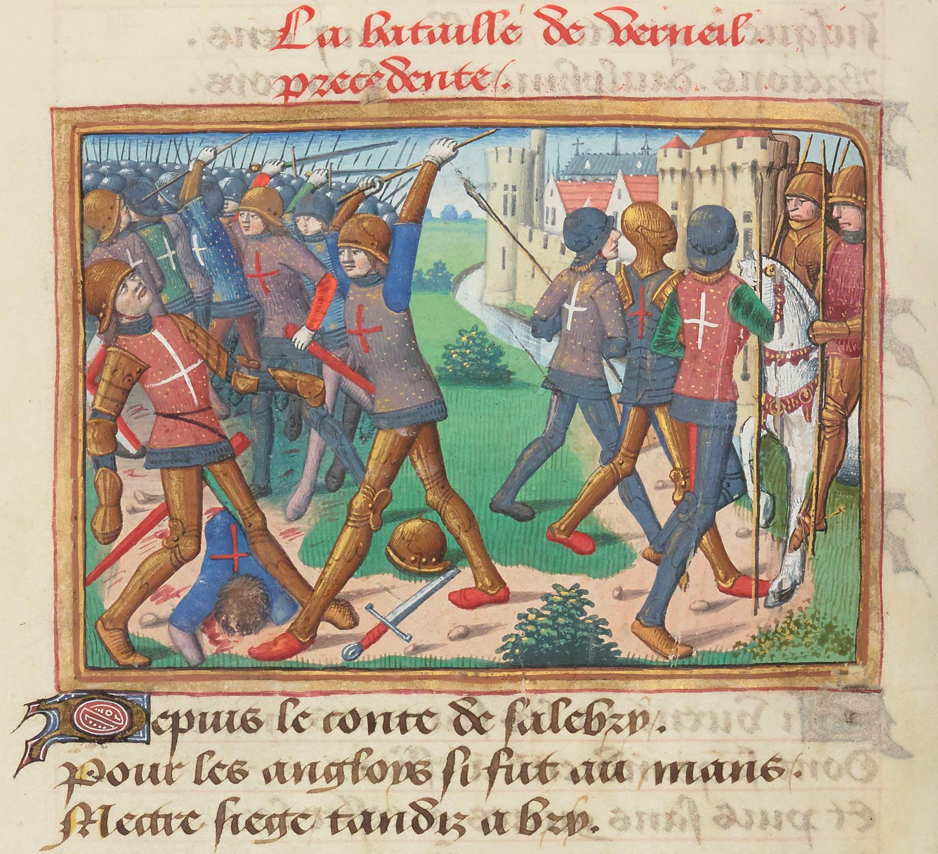 Bataille de Verneuil (1424).